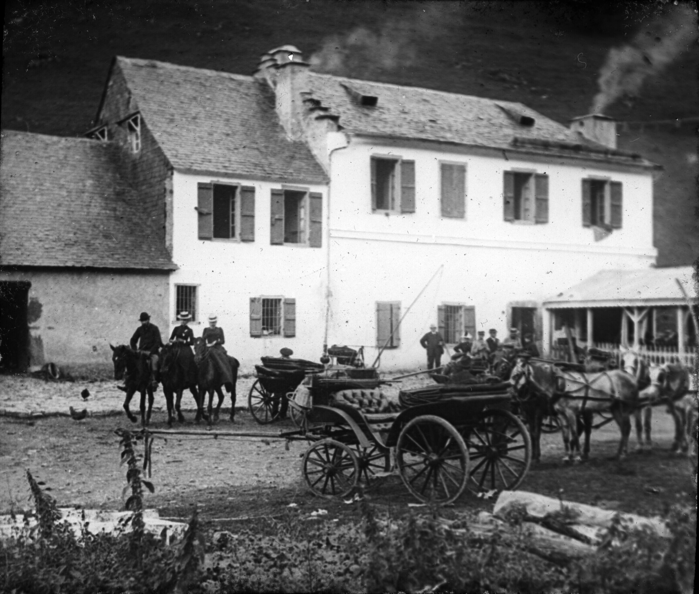 L'Hospice de France à Luchon (Haute-Garonne, France), vers 1890 Fonds Trutat - Photographie ancienne Cote : TRU C 326 Localisation : Fonds ancien Original non communicable Titre : Hospice du port de Venasque, Luchon Auteur : Trutat, Eugène Rôle de l’auteur : Photographe Lieu de création : Bagnères-de-Luchon (Haute-Garonne ; canton) Date de création : : 19e siècle, 4e quart Mesures : 12 x 9cm Observations : Plaque constituée de deux verres dissociés Mot(s)-clé(s) : -- Refuge (montagne) -- Femme -- Cheval -- Voiture à attelage -- Bâtiment -- Bagnères-de-Luchon (Haute-Garonne ; canton) -- Venasque, Port de (France ; col) -- Hospice de France (Bagnères-de-Luchon) -- Pique (France ; haute-vallée) -- Luchonnais, Massif du (France) -- 19e siècle, 4e quart Médium : Photographies Médium : Positifs sur plaque de verre -- Positifs au collodion sur plaque de verre -- Noir et blanc -- Scènes -- Vues d'architecture Bibliothèque de Toulouse. Domaine public